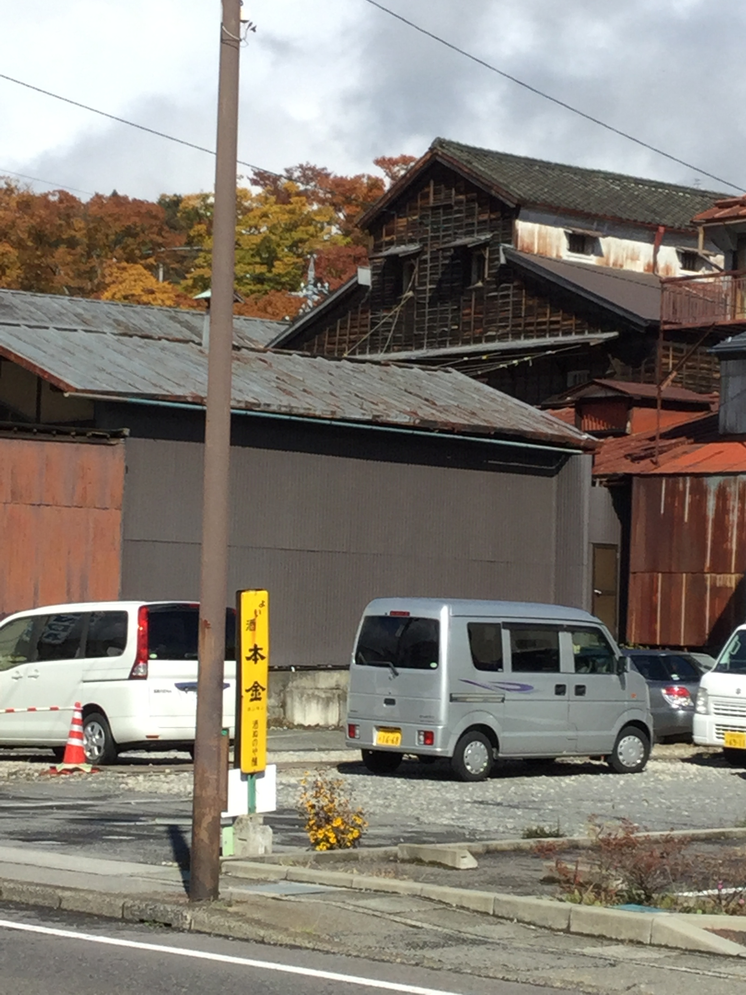 傾斜地に建てられた本金酒造の酒蔵。傾斜を活かして１階は半地下となっていて酒の保管に利用していると店主が説明してくださった。2018.10.27